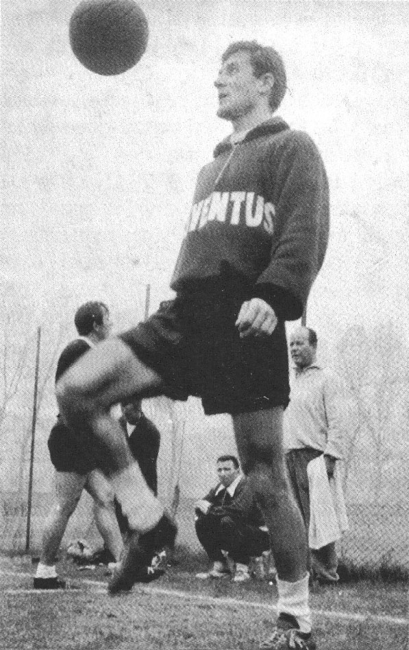 Il calciatore italo-argentino Humberto Jorge Rosa in allenamento alla Juventus nella stagione 1961-62.